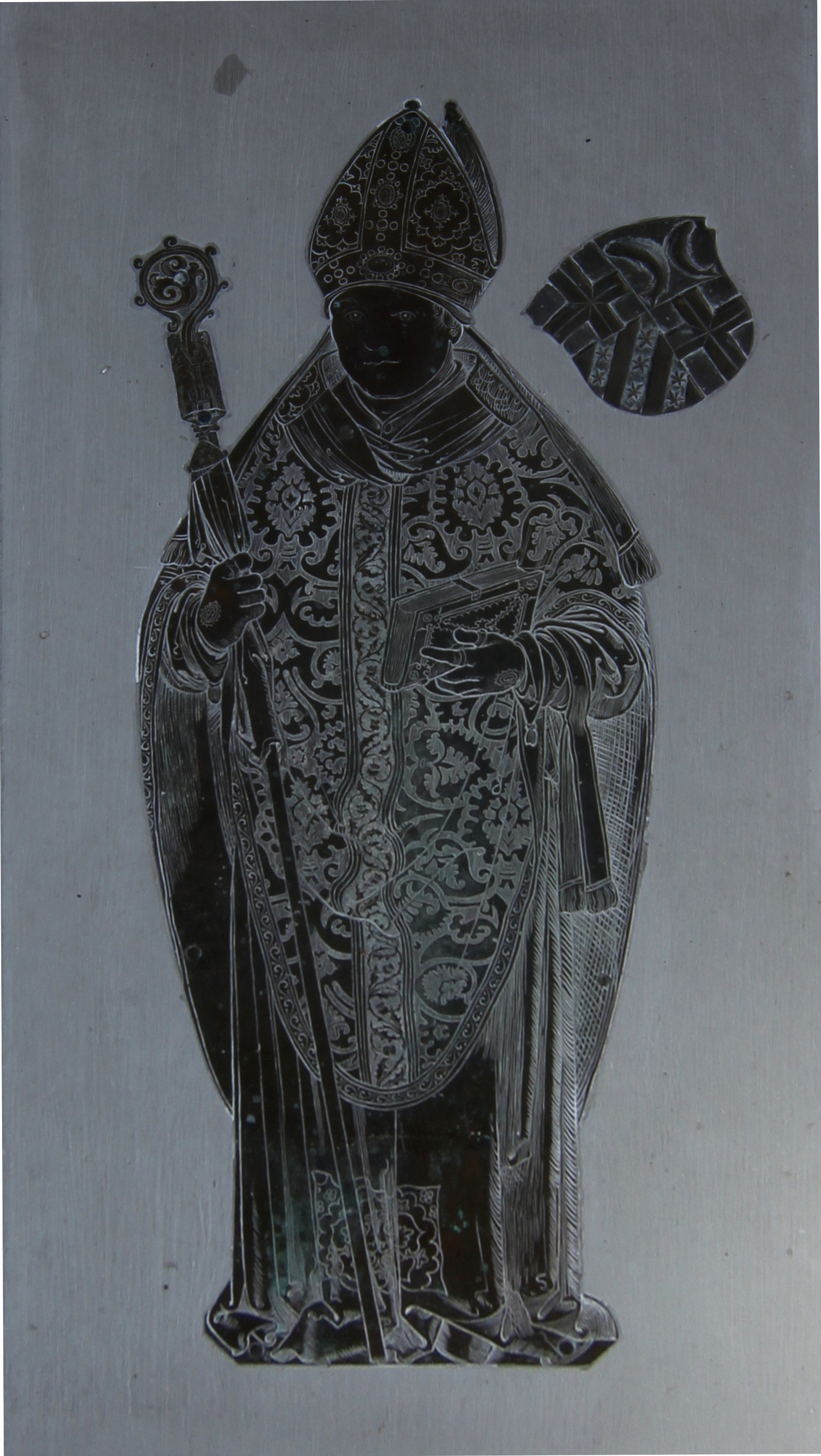 Epitaph des Reichenauer Abtes Georg Fischer (Abt von Zwiefalten) (Amtszeit: 1516–1519)